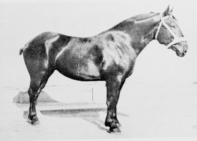 Baladeuse, pouliche trait du Maine de 3 ans. La Vie à la campagne : travaux, produits, plaisirs, Hachette, 15 octobre 1930. Droits : domaine public